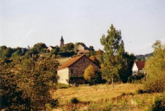 Photo de Lostanges